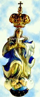 Vírgen de los Treinta y Tres